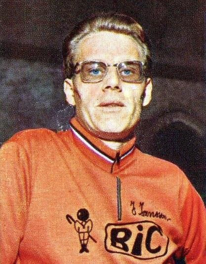 Jan Janssen en 1969 - Campioni dello Sport 1969-1970, n°197